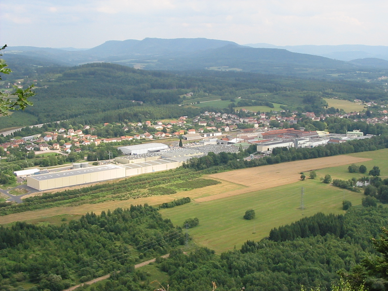 Papeteries Clairefontaine à Étival dans le département des Vosges.